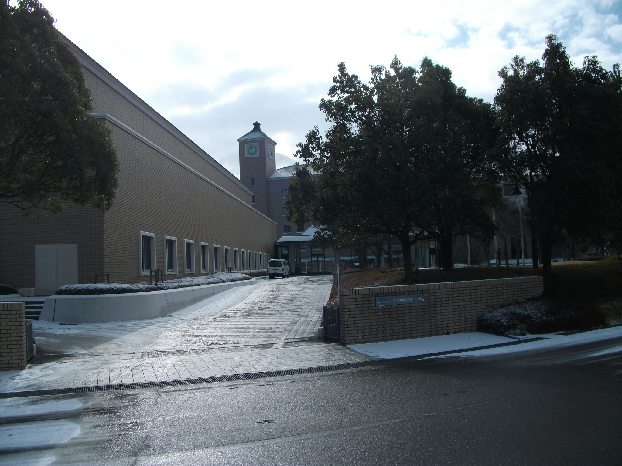 広島県東広島市、酒類総合研究所